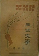 『三田文學』は、慶應義塾大学で1910年（明治43年）に創刊された文芸雑誌。